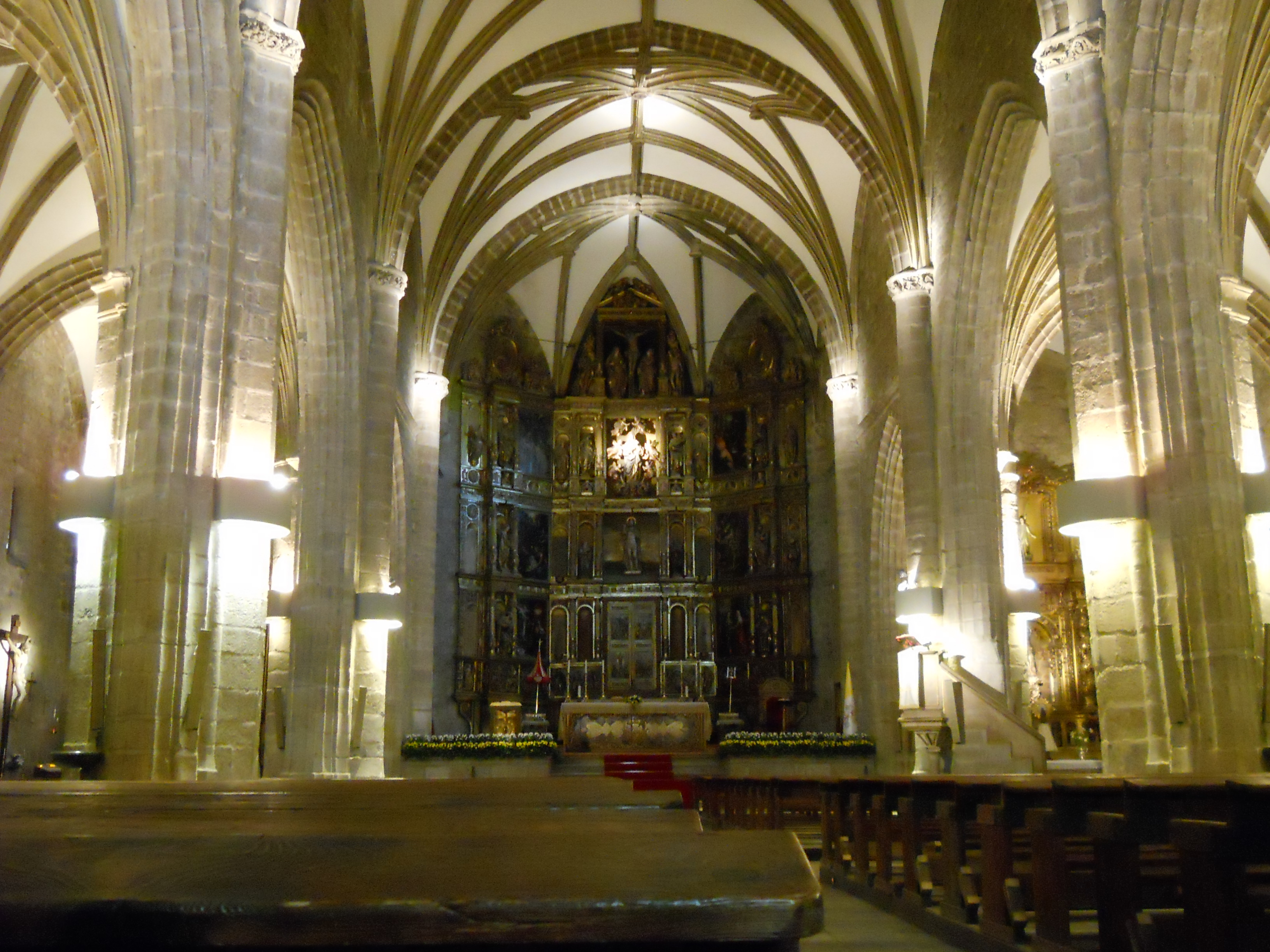 Interior de la basílica de Nuestra Señora de la Asunción, Colmenar Viejo, Madrid, España